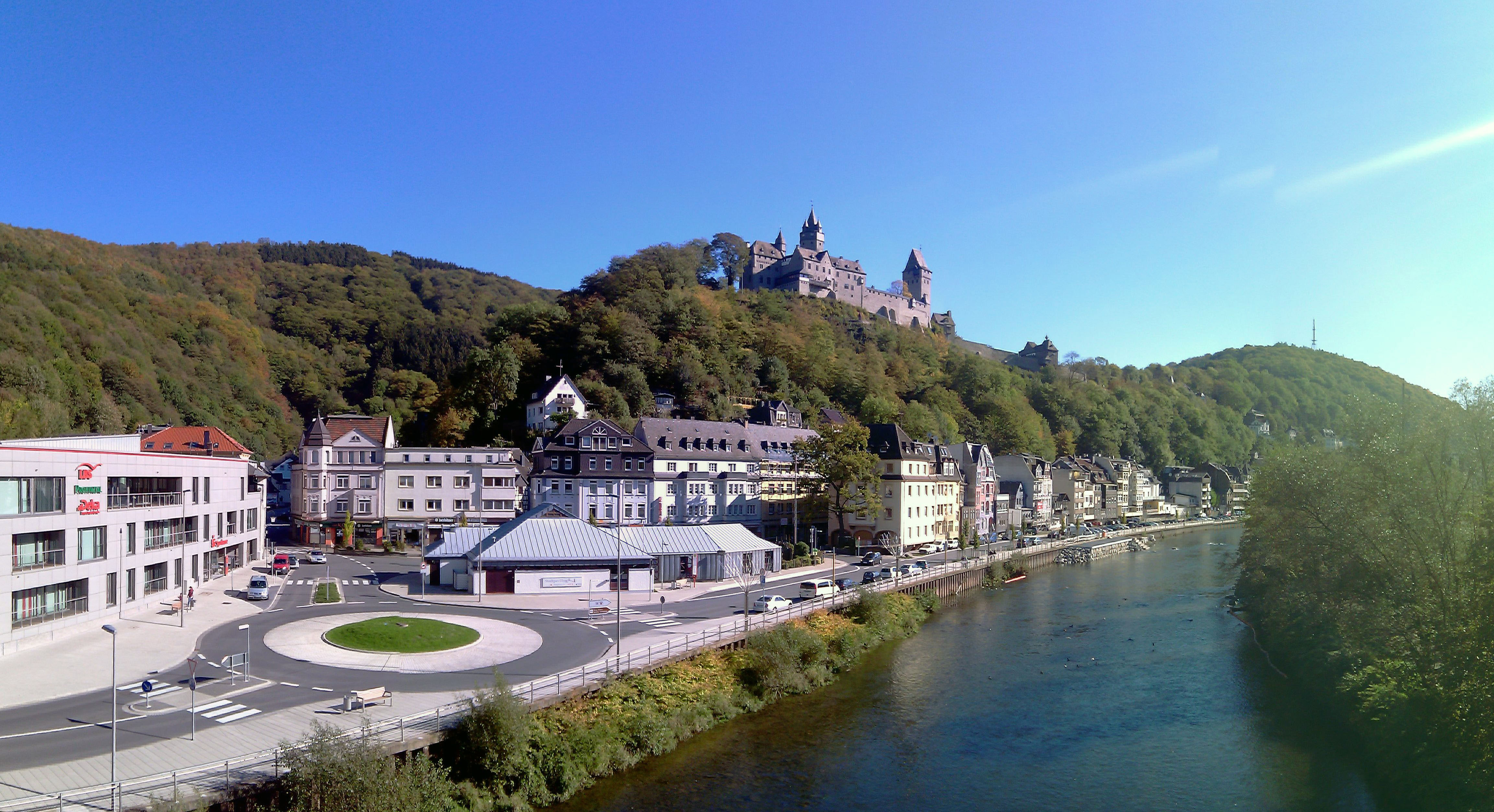 Panorama vom Markaner in Altena vom 16.10.2011, aufgenommen mit Smartphone (HTC HD2), zusammengesetzt mit Microsoft ICE